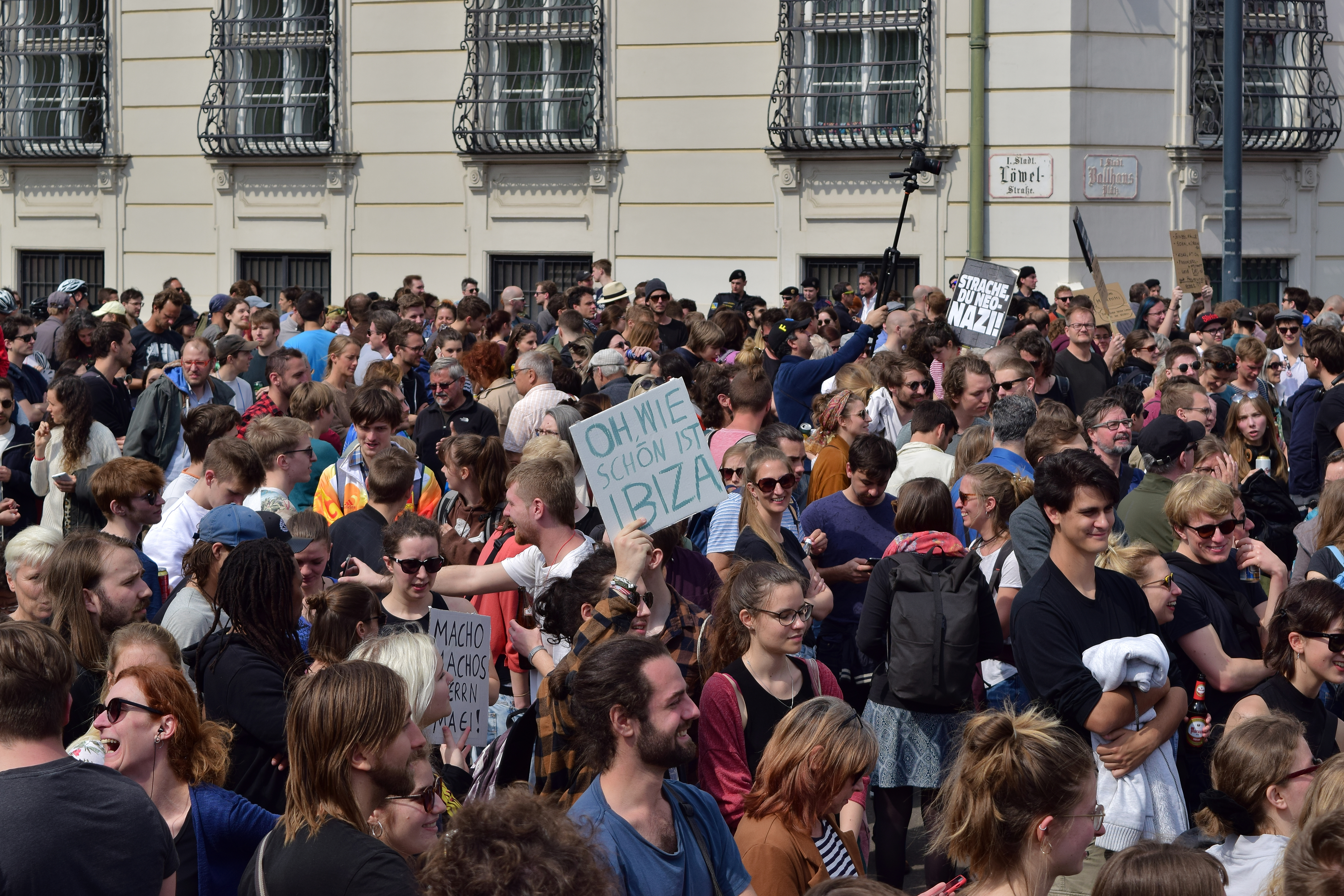 Demo anlässlich der Ibiza-Affäre, bei der Neuwahlen und Rücktritte gefordert wurden. Mit dabei waren VertreterInnen bzw. AktivistInnen sämtlicher Oppositionsparteien.